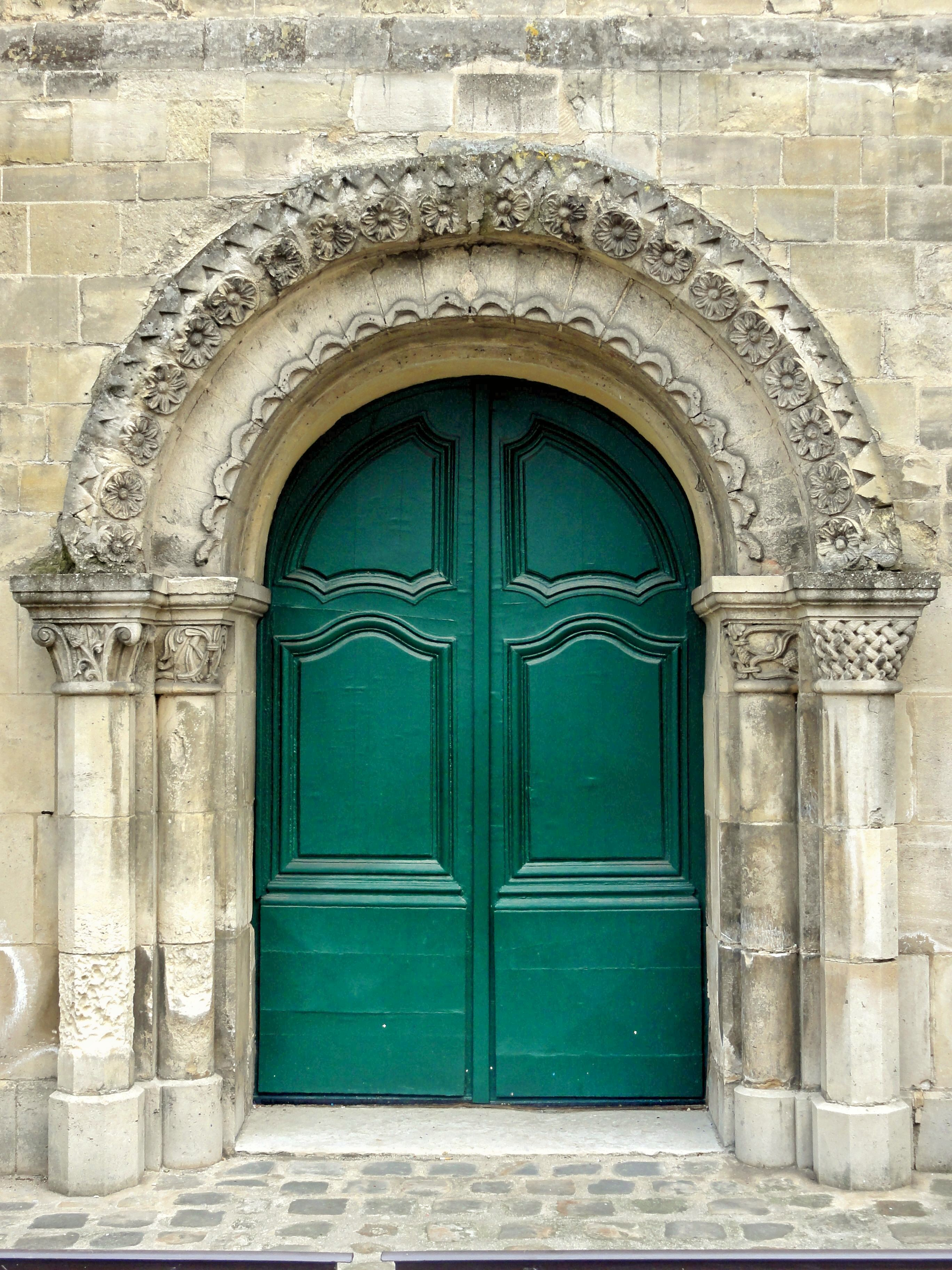 Portail occidental.